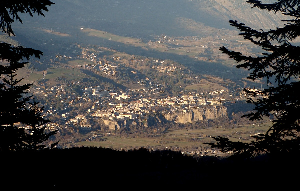 La ville d'Embrun (Hautes-Alpes) vue depuis le site de la fontaine de l'Ours (forêt de Boscodon).